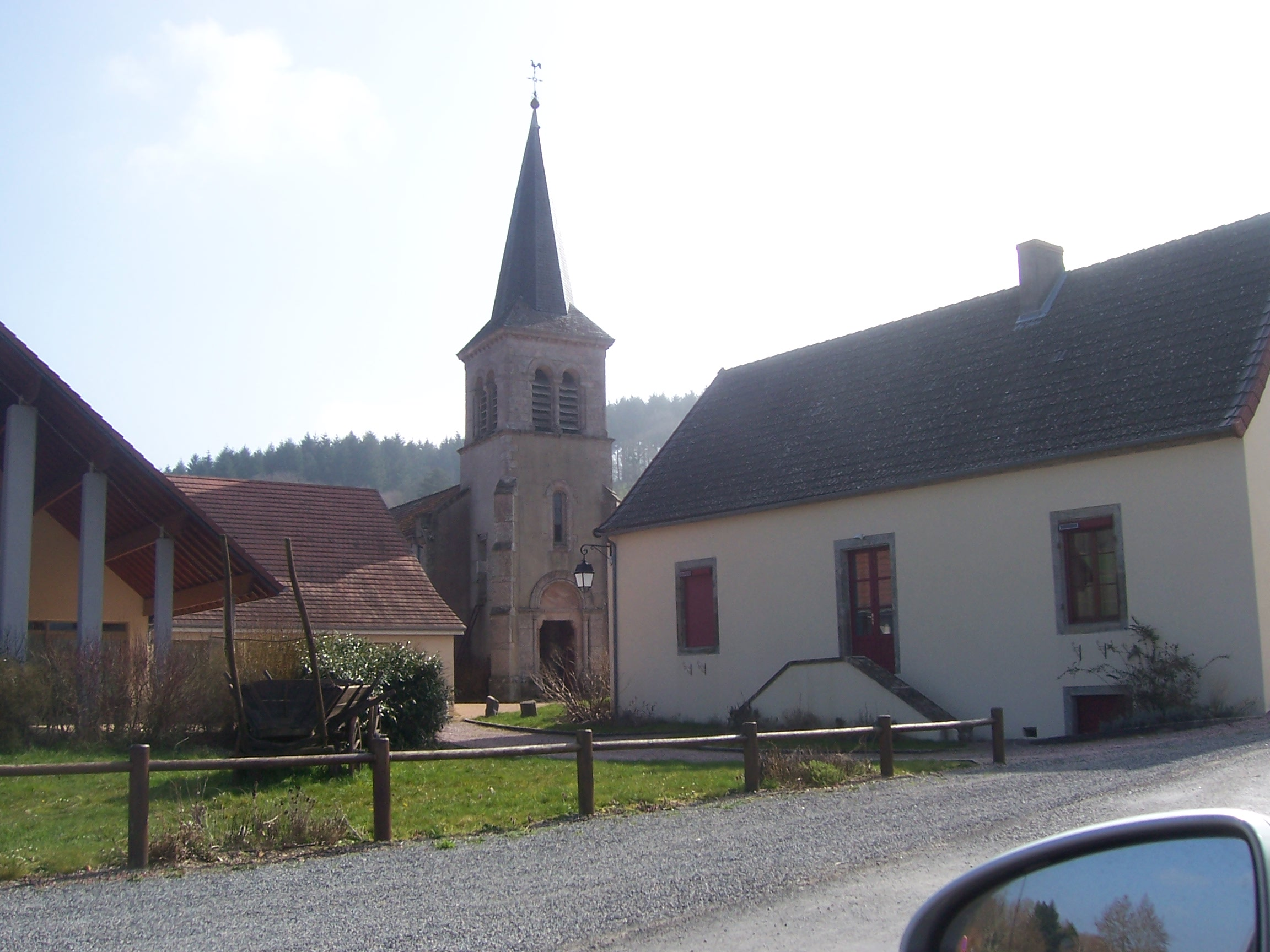 Eglise de Cuzy